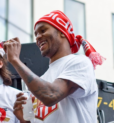 Alcides